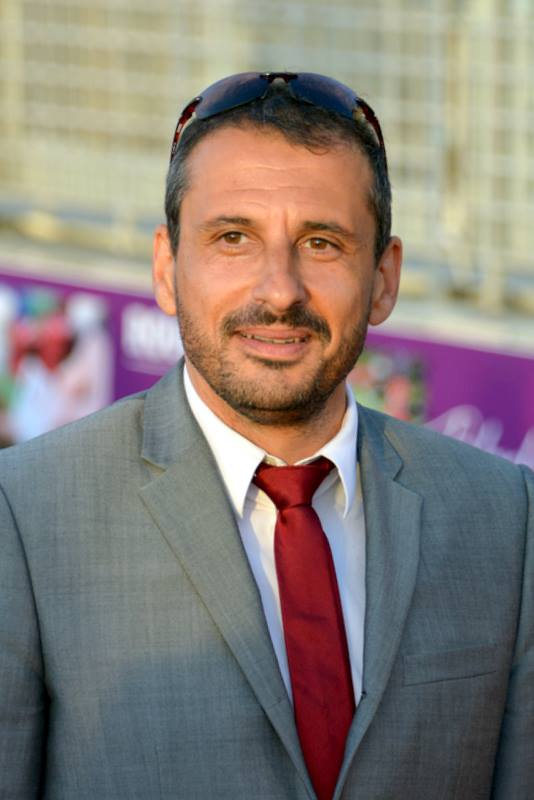 Safy Nebbou au festival du film de Cabourg